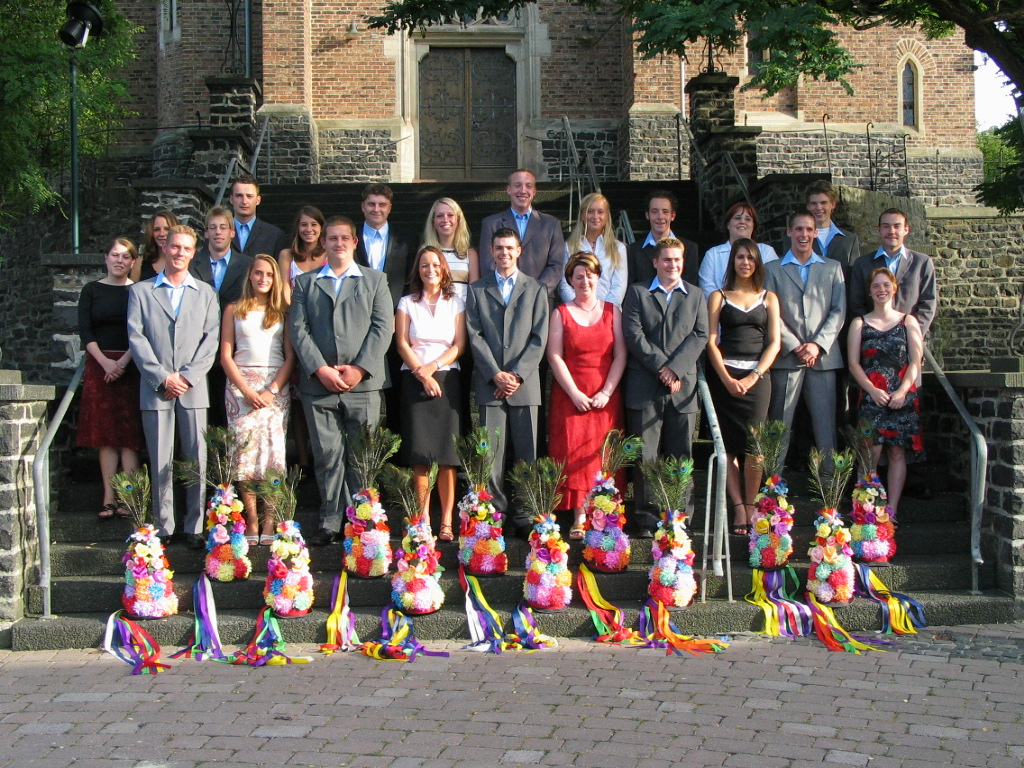 Kirmesburschen 2003 Obertiefenbach (Beselich)